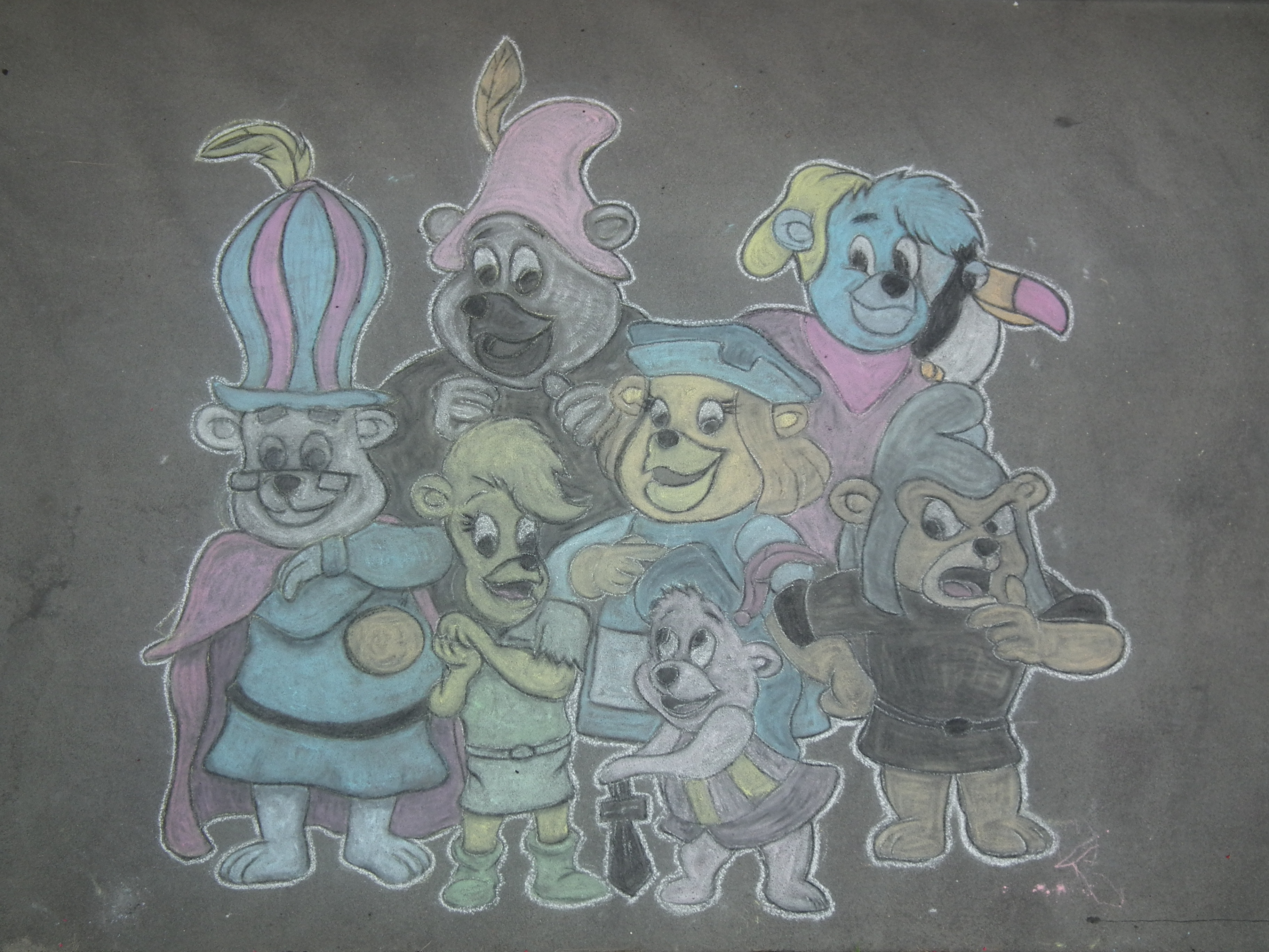 Streetart in Dresden, Kreidebild Gummibärenbande